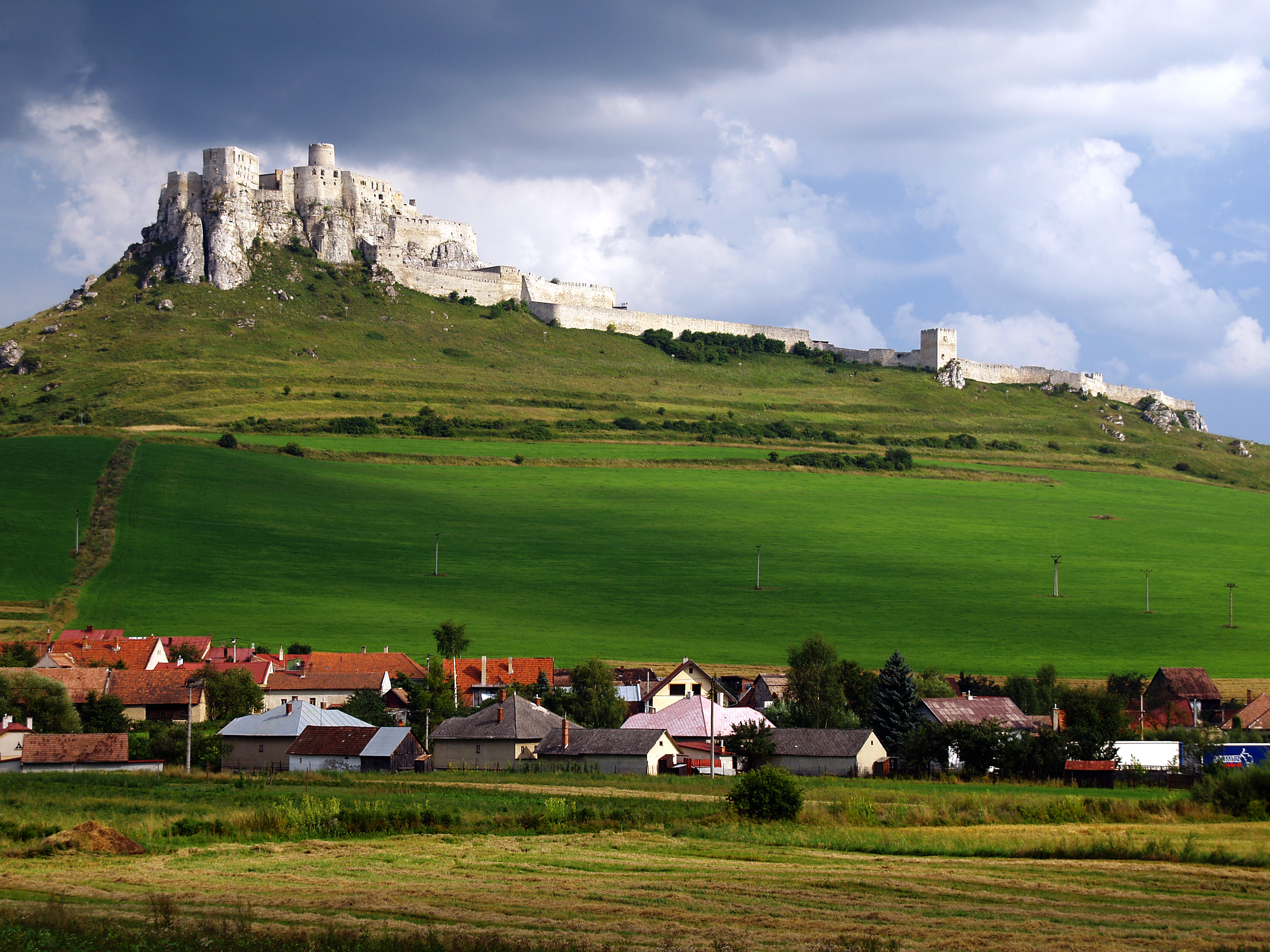 Spisske Podhradie - Spišský Hrad